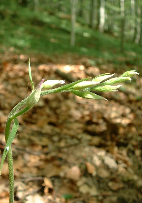 Cephalanthera rubra, Céphalanthère rouge (boutons floraux), Bucey-lès-Gy, juin 2004